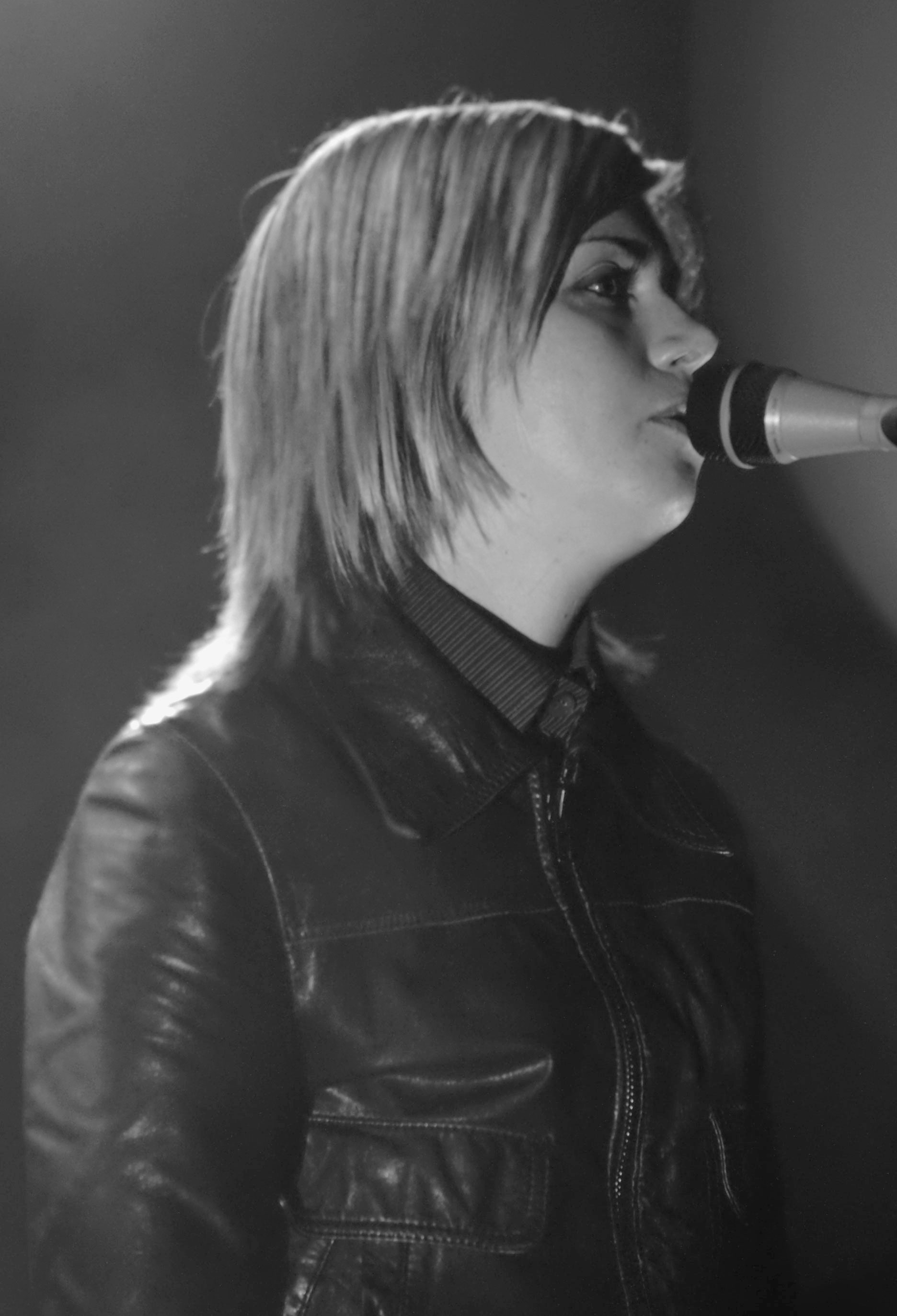 Anna Ternheim live